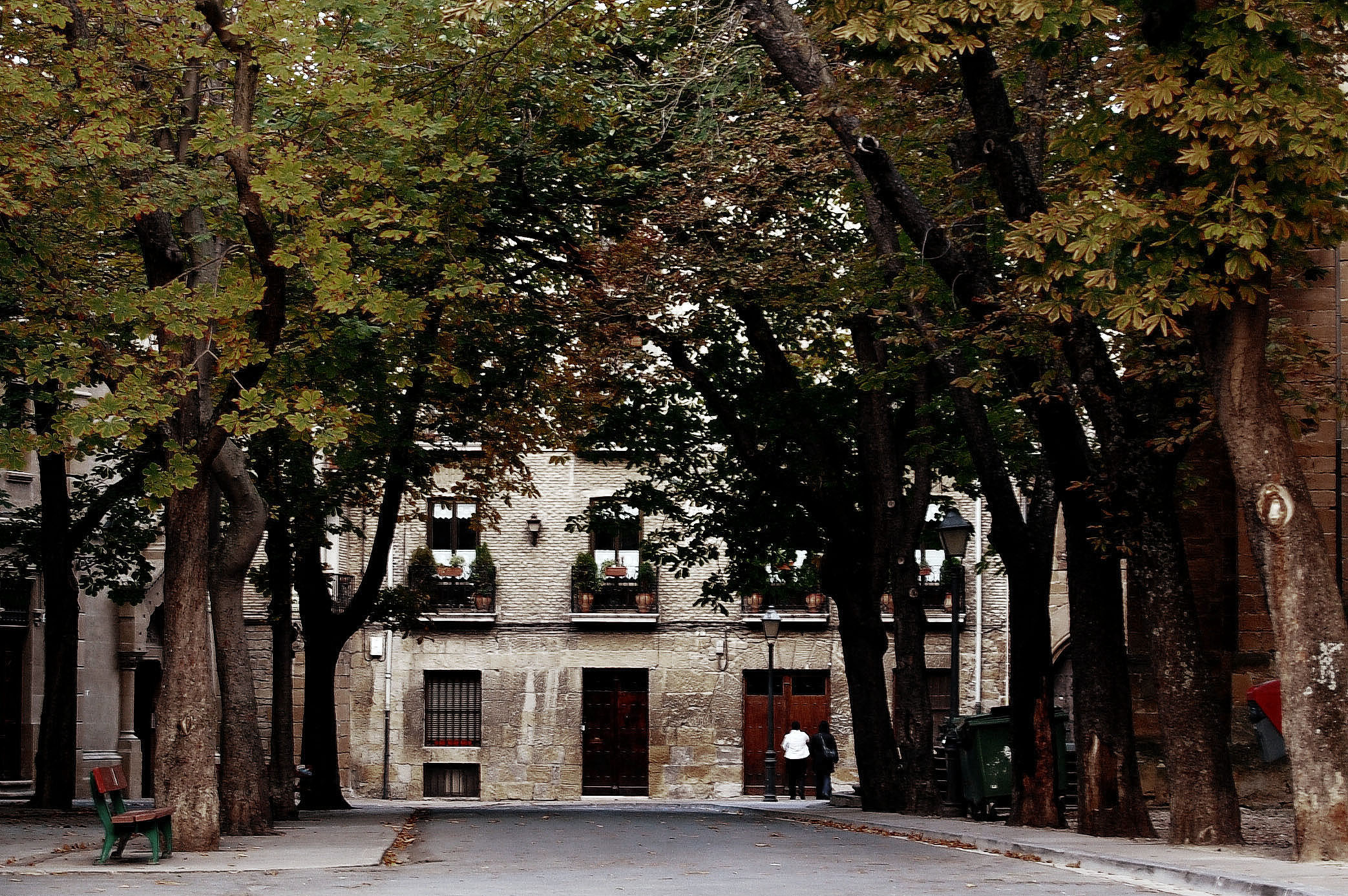 Detalle de una de las calles de Pamplona (Navarra, España).